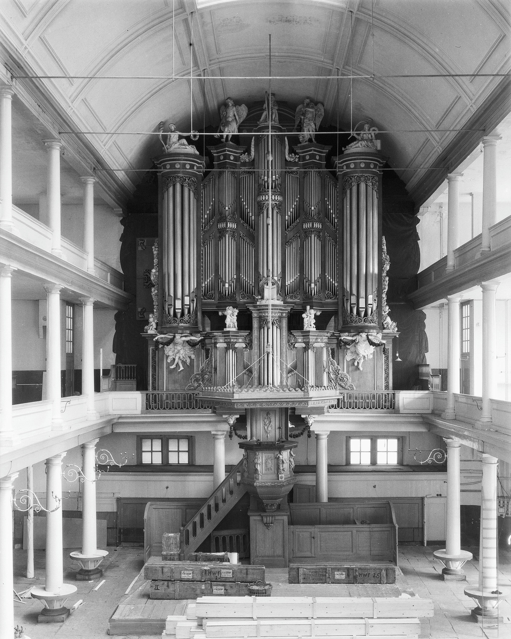 v.m. Herst.Ev.Lutherse Kerk: orgel van St.Eusebius Arnhem